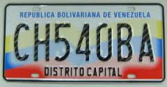 identificacion vehicular